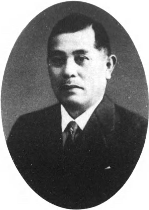 寒川恒貞（さんがわ つねさだ、東海電極製造社長）